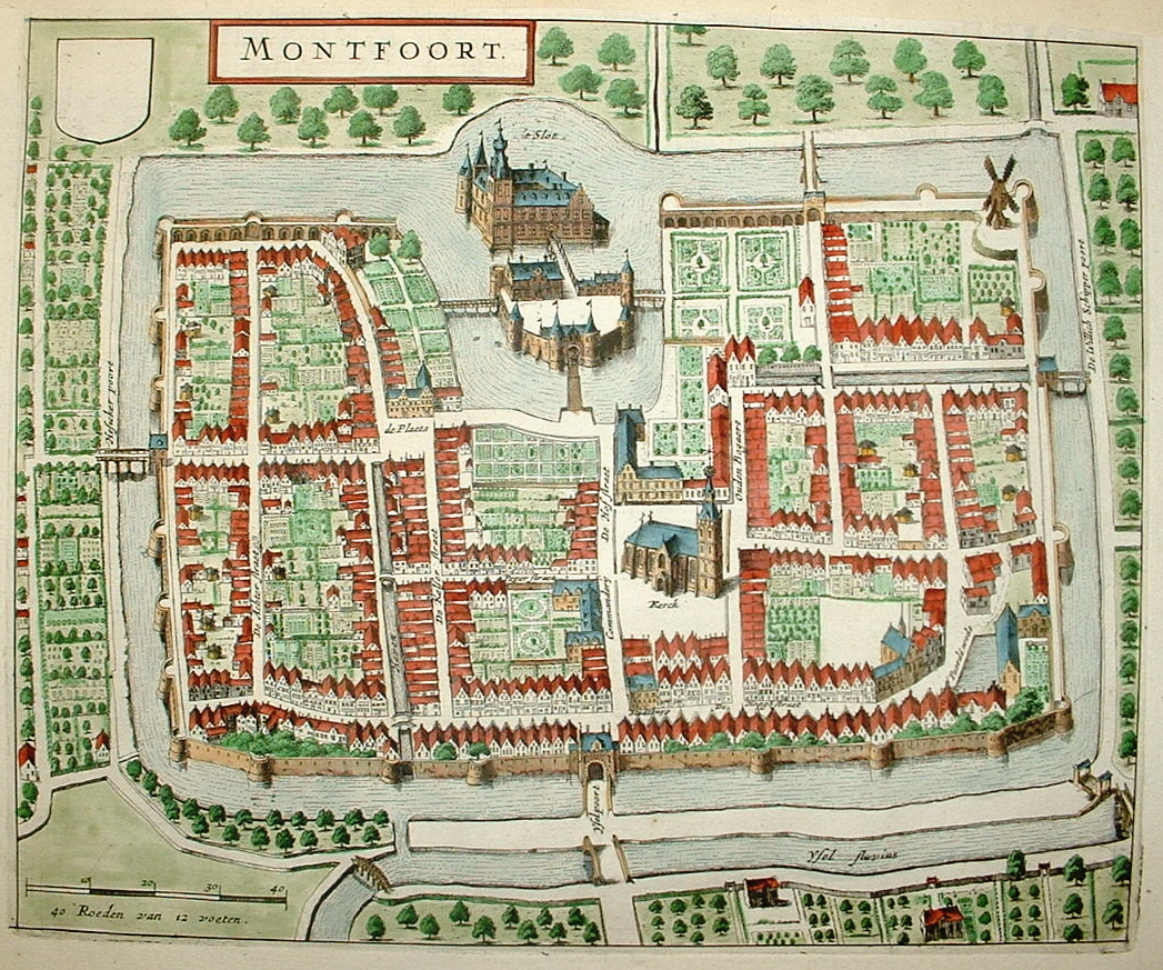 Montfoort op een kaart van J. Blaeu uit 1649.